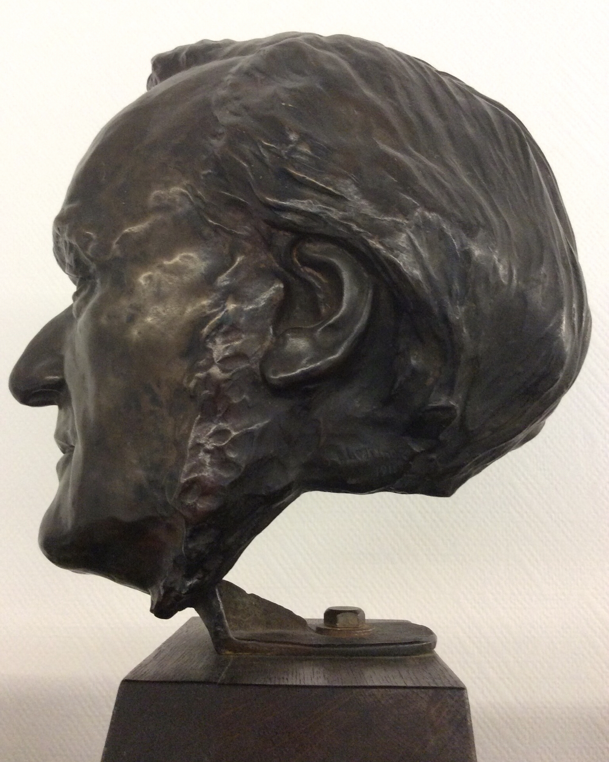 Richard Wagner Bronzekopf; Albrecht Leistner, 1911